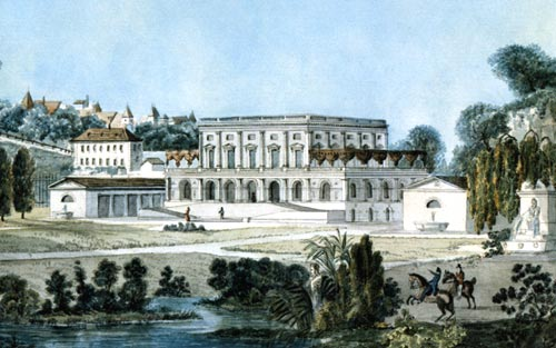 Gravure du palais Eynard réalisée par l'architecte Giovanni Salucci et issue du fonds du Centre d'iconographie genevoise